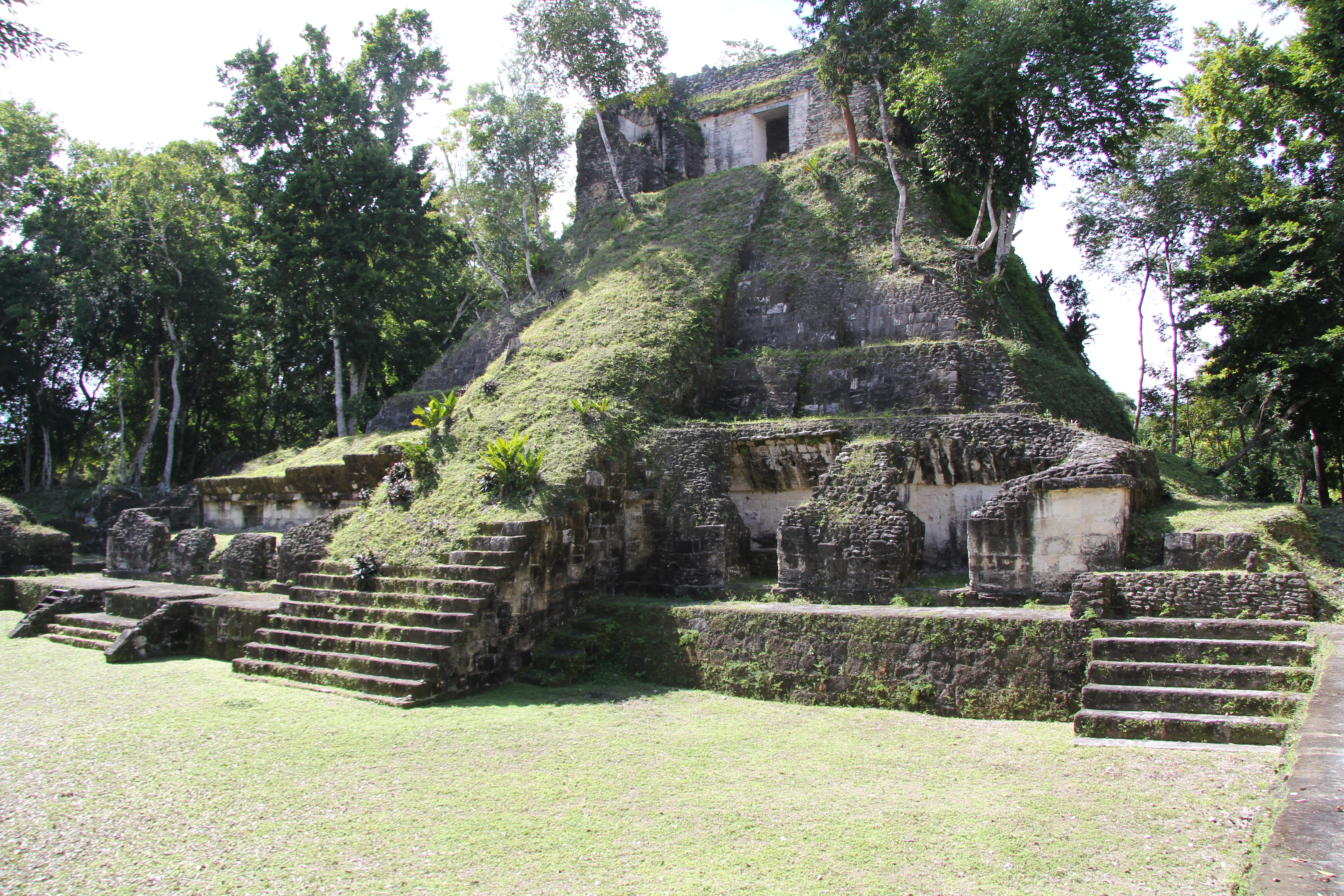 Ruinas mayas del parque Yaxhá Nakum Naranjo, Reserva de la Biosfera Maya, Petén, Guatemala